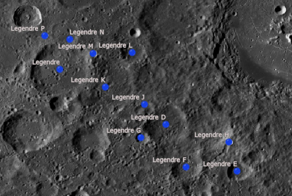 Cráter lunar Legendre. Cráteres satélite. (Imagen LRO)